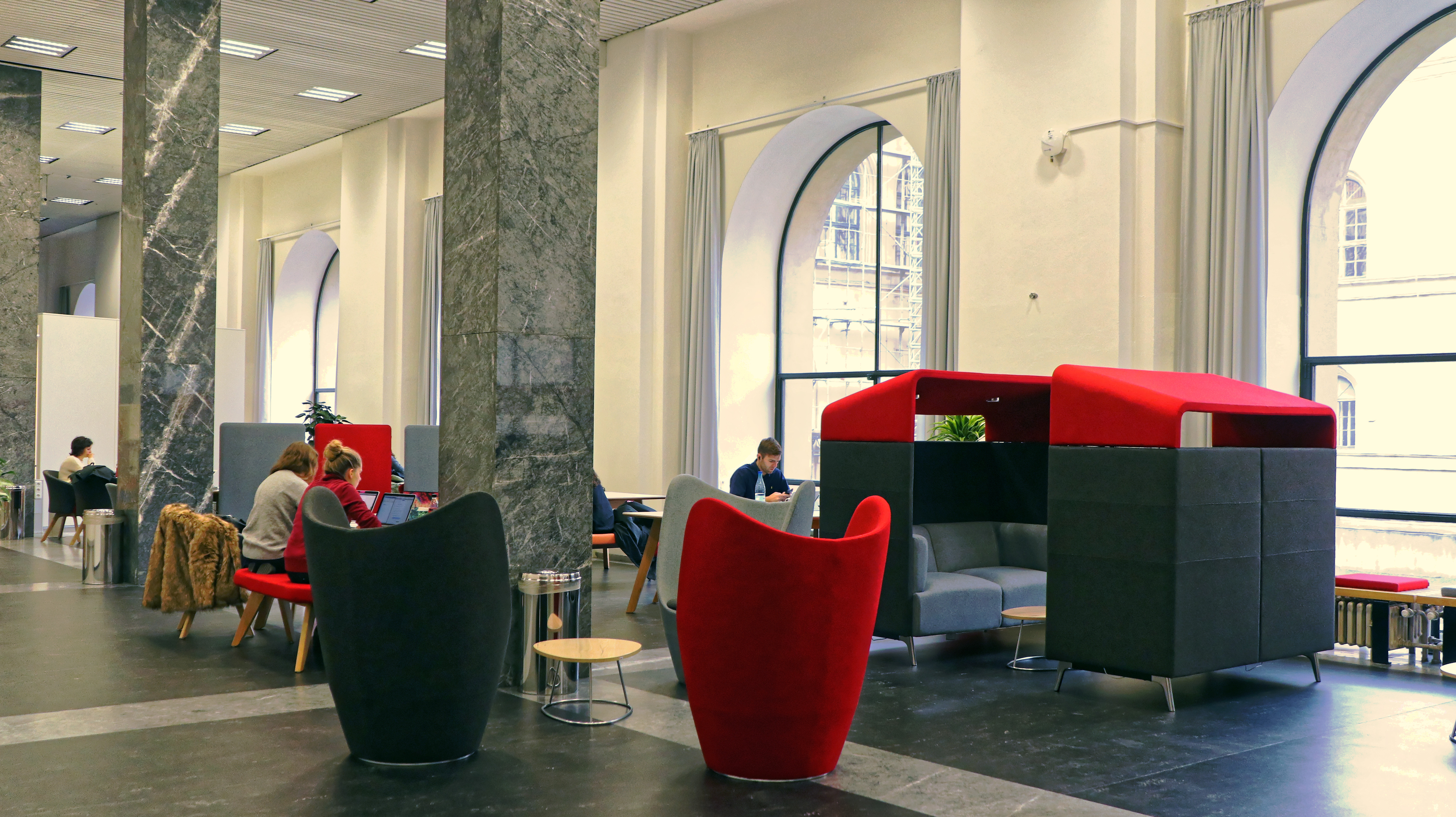 Öffentlicher Lese- und Kommunikationsbereich in der Bayerischen Staatsbibliothek in München, von Montag bis Freitag von acht bis 19 Uhr geöffnet für Publikum geöffnet.